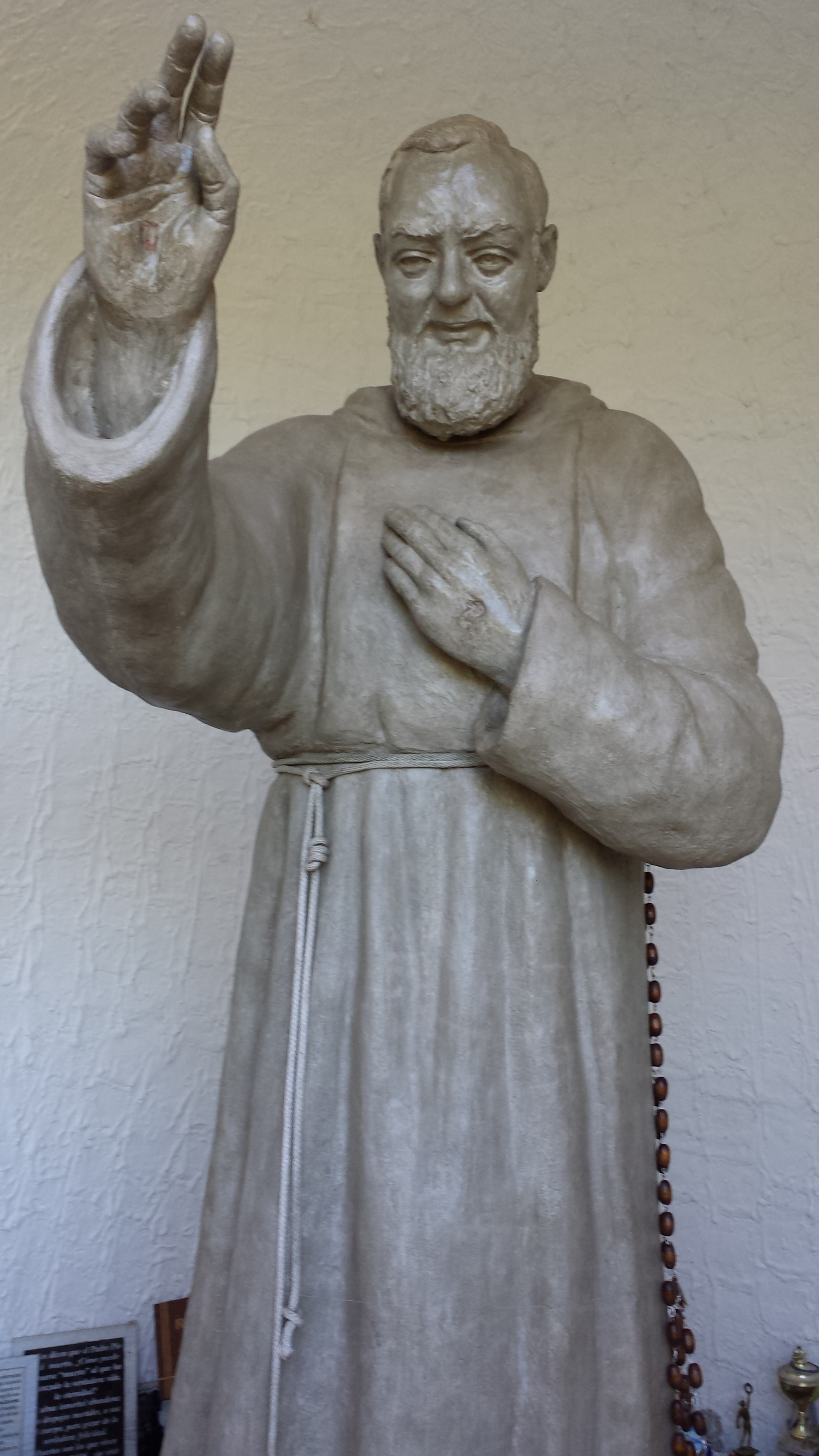 estatua del Padre Pío en la gruta de Uruguay